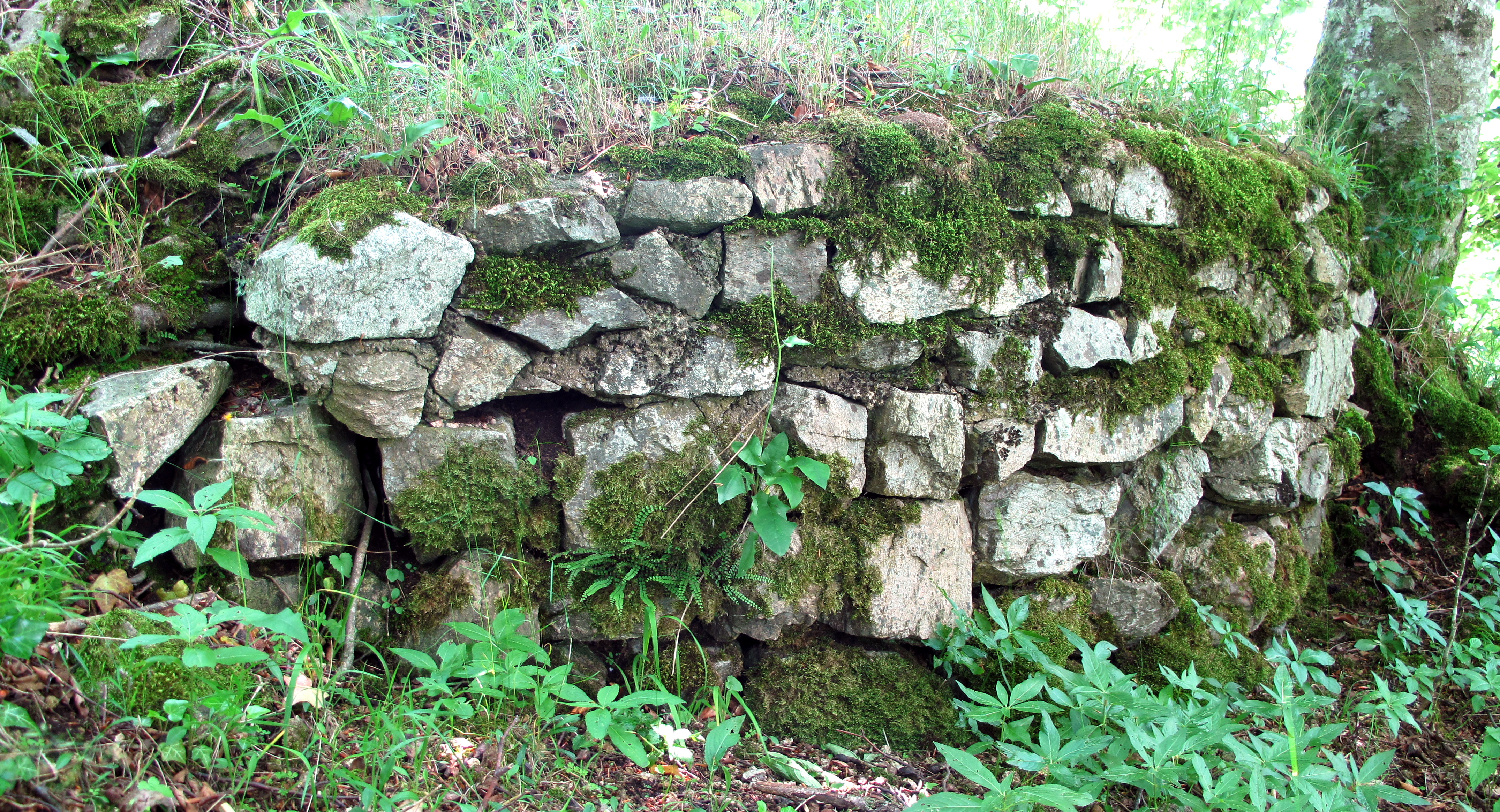 Rest der Umfassungsmauer der Hinterburg auf dem nördlichen Felskopf.